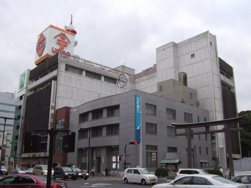 上野百貨店新館「新うえの」